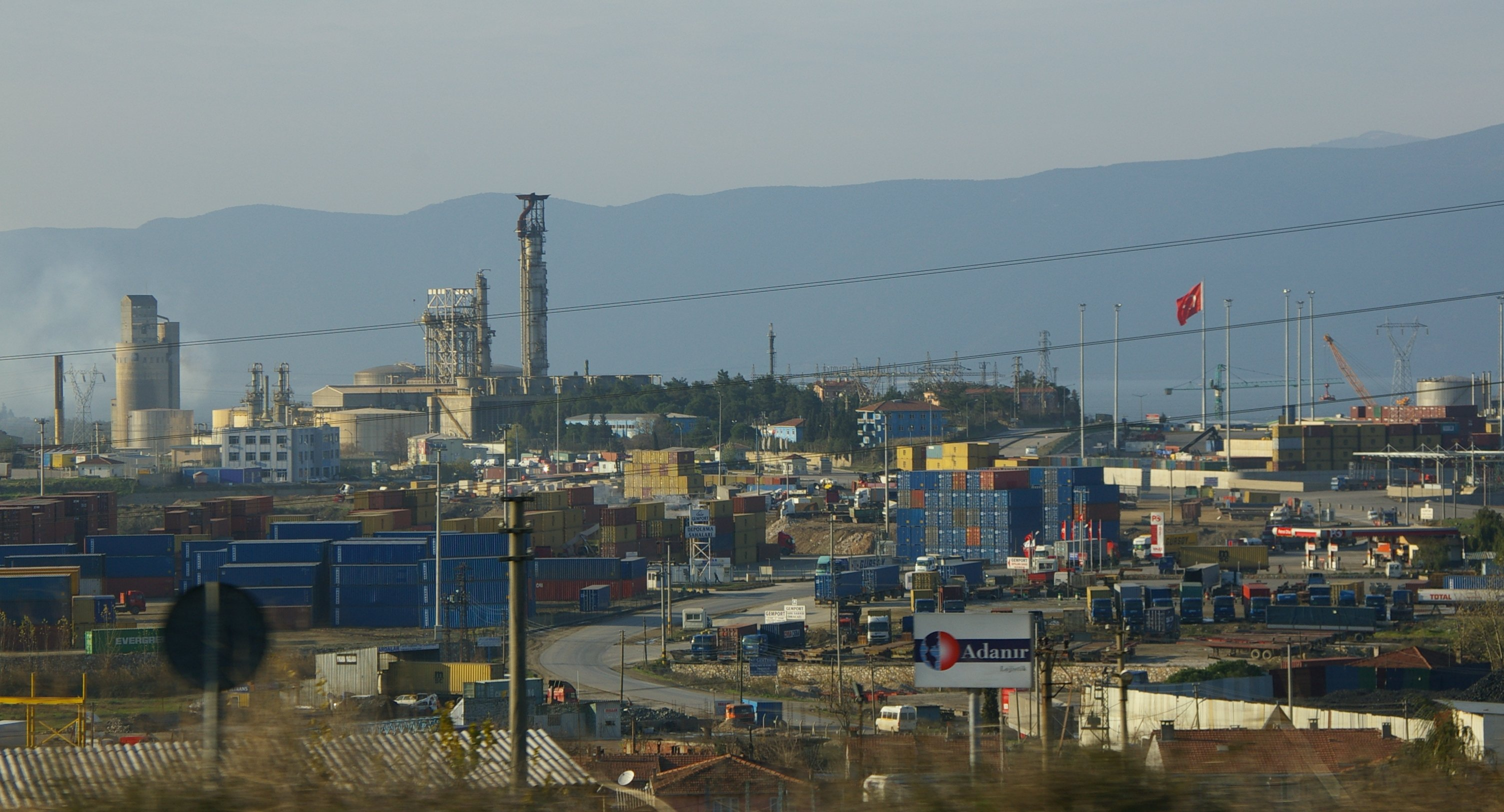 Gemlik OSB